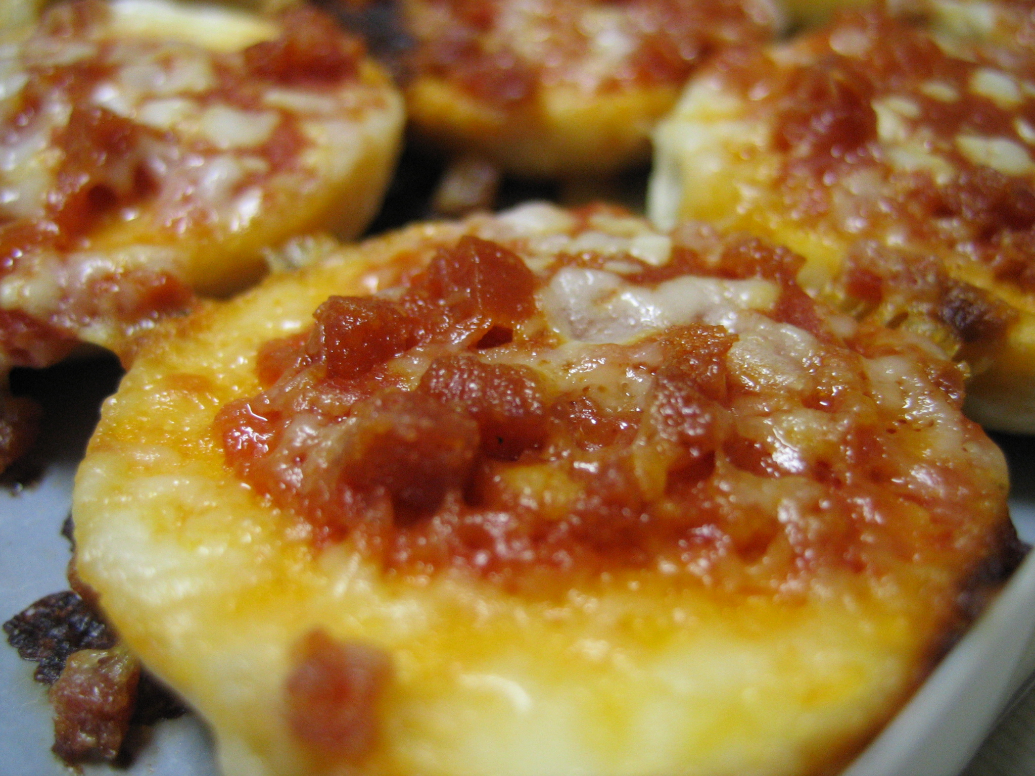 Some pizza bagels, pepperoni - taken close for detail.